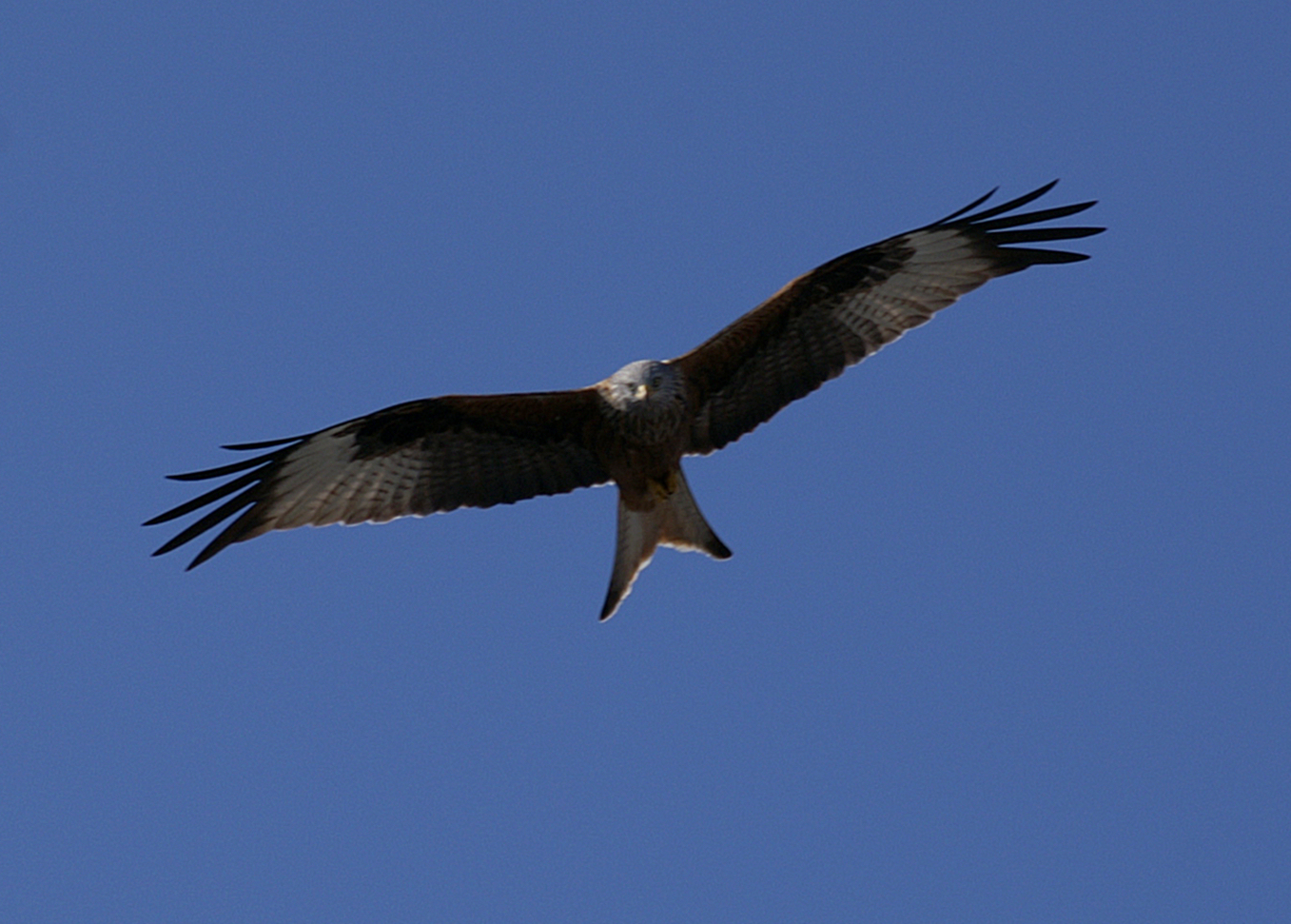 Rotmilan (Milvus milvus) im Flug